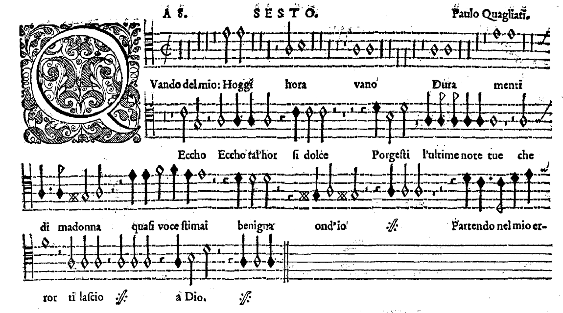 Facsimil de una página de Harmonia Celeste (Peuernage, 1589), "Quando del mio" , Paolo Quagliati (1555-1628)